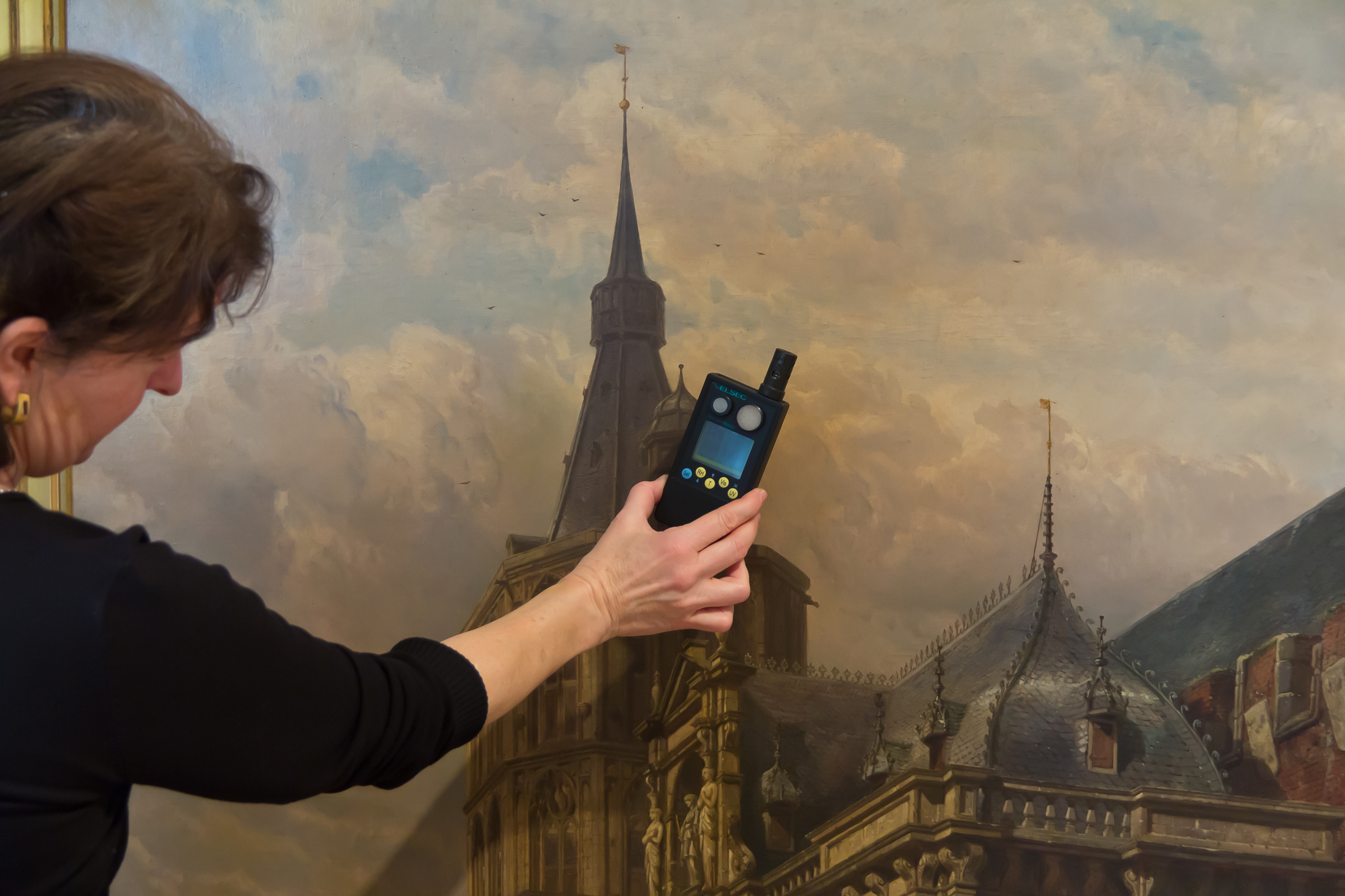 Kölnisches Stadtmuseum. Sonderausstellung: "Zur Sache Schätzchen! - Raritäten aus dem Depot"